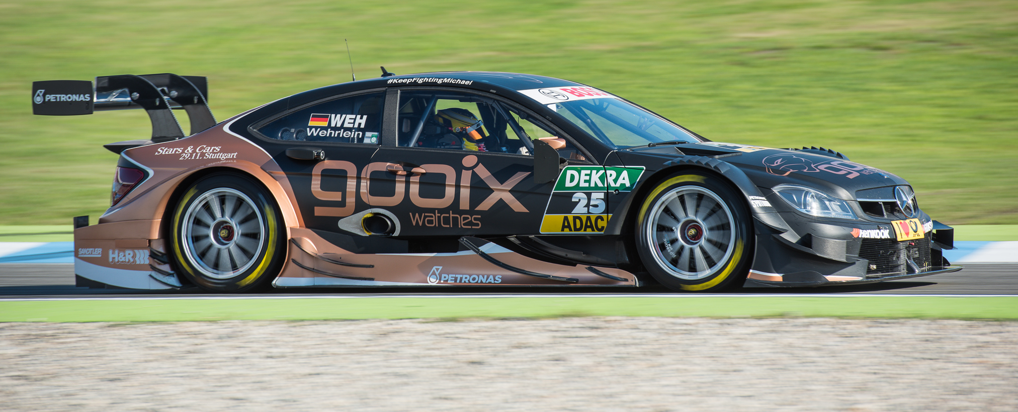 DTM,Deutsche Tourenwagen Masters,HWA AG,Hockenheimring,Motorsport,Pascal Wehrlein,gooix Mercedes AMG C-Coupe